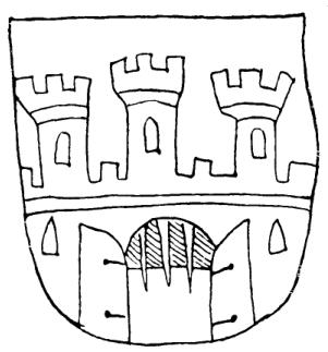 Grzymała z Kroniki Soboru w Konstancji